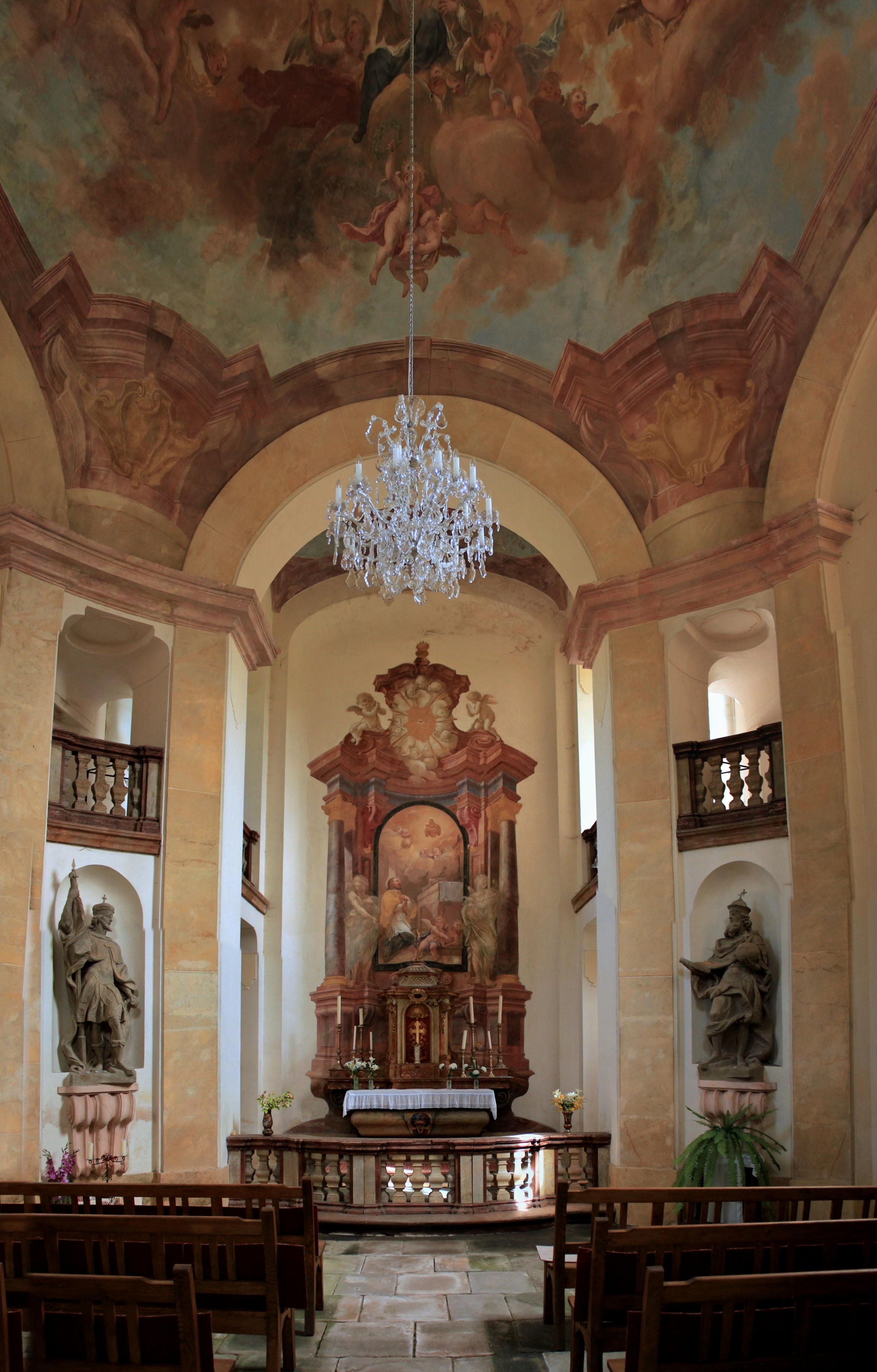 Kostelík sv. Jana Nepomuckého ve Velkém Valtinově